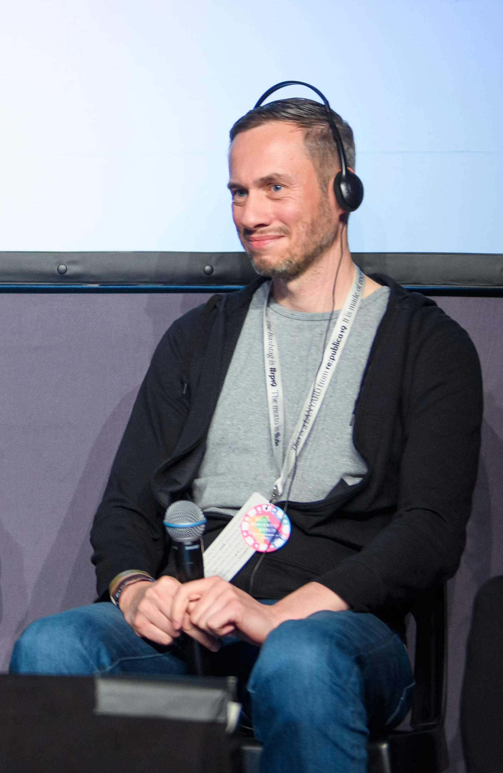 Session: Mensch, Maschine, Mündigkeit: Wie sich Kulturverwaltungen neu erfinden Speaker: Birgit Schneider-Bönninger, Klaus Lederer, Nicolas Zimmer, Sylvie Kürsten